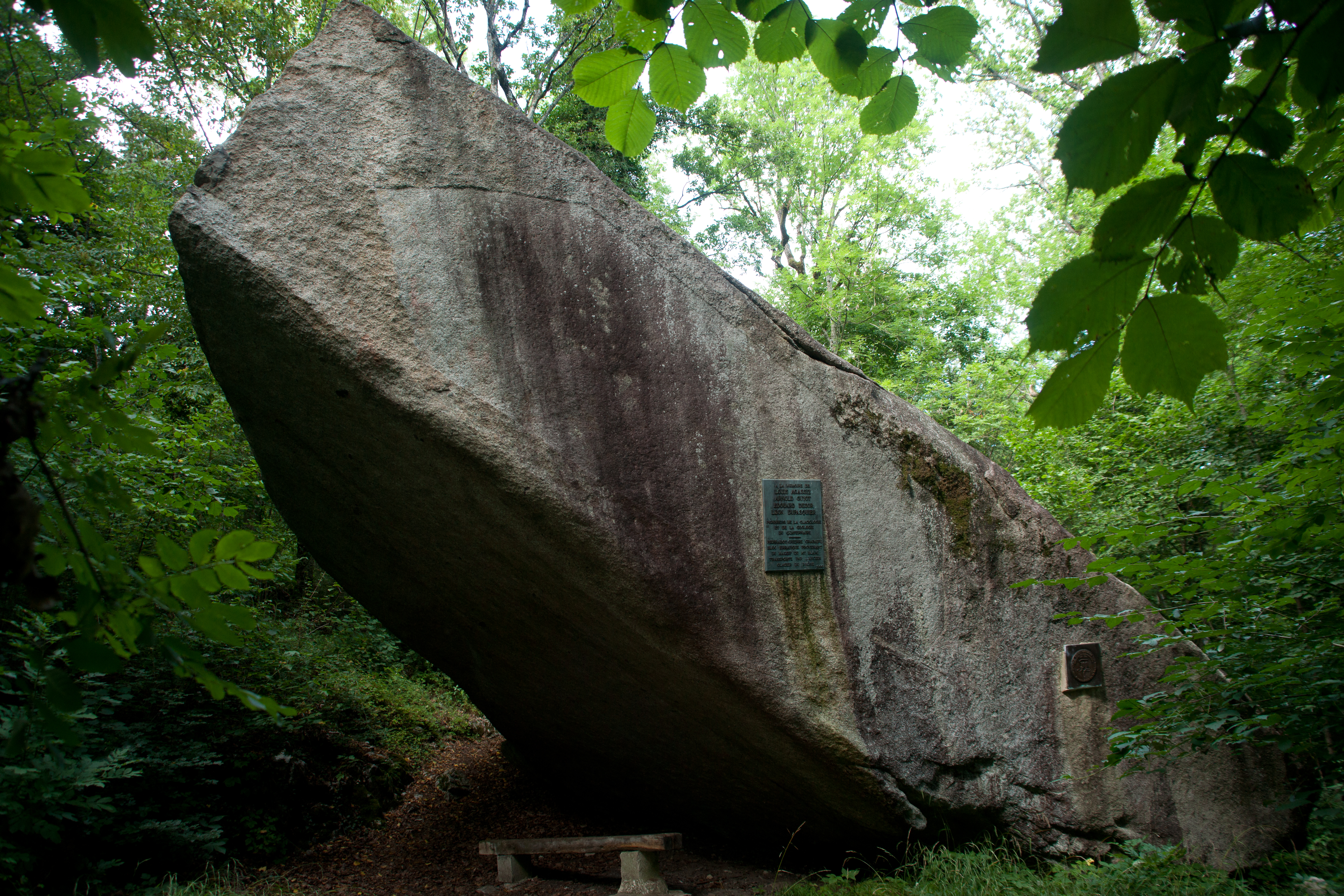 Pierrabot, bloc erratique au dessus de Neuchâtel